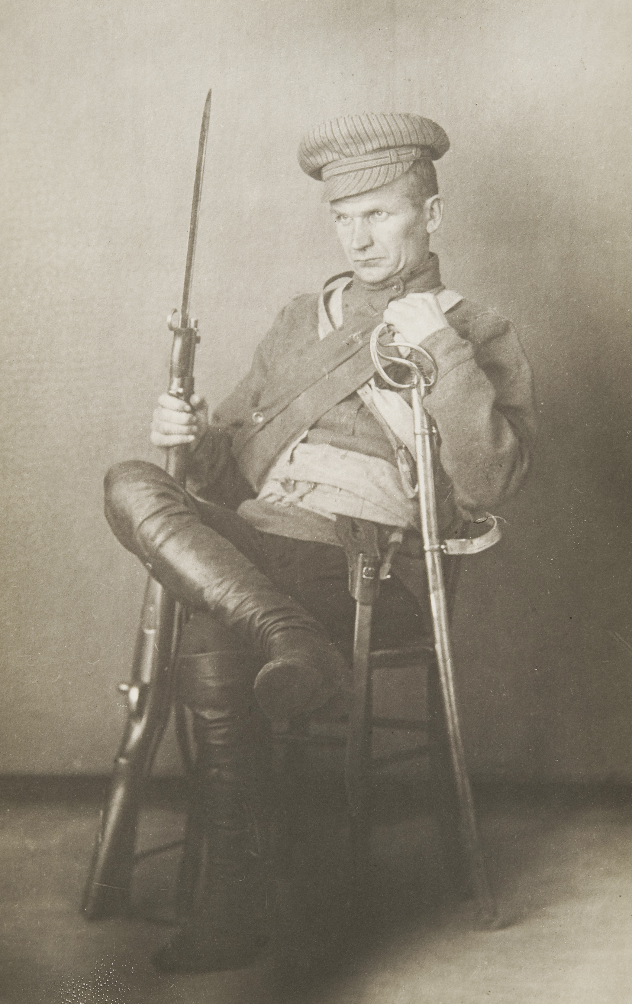 Kasperi Tanttu punapäälikkönä 1918